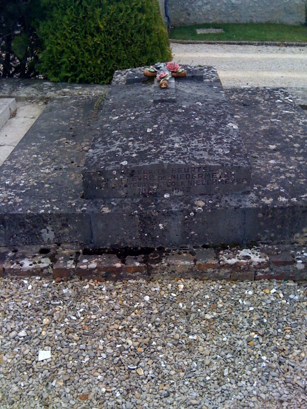 Tome de Gustave Lefèvre au cimetière de la ville haute de Provins. Sa famille repose dans le même tombeau et deux autres non loin dans le même cimetière.